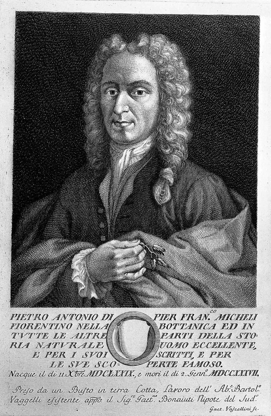 Pier'Antonio Micheli. Line engraving by G. Vascellini after B. Vaggelli. Iconographic Collections Keywords: Pietro Antonio Michell; B. Vaggelli